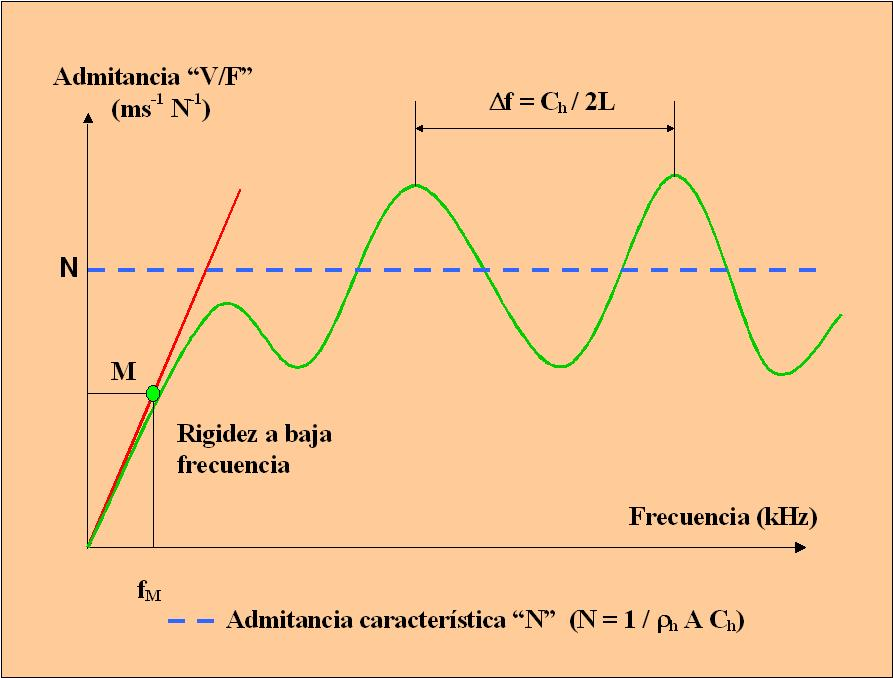 Curva teórica de admitancia obtenida en un ensayo de impedancia mecánica.